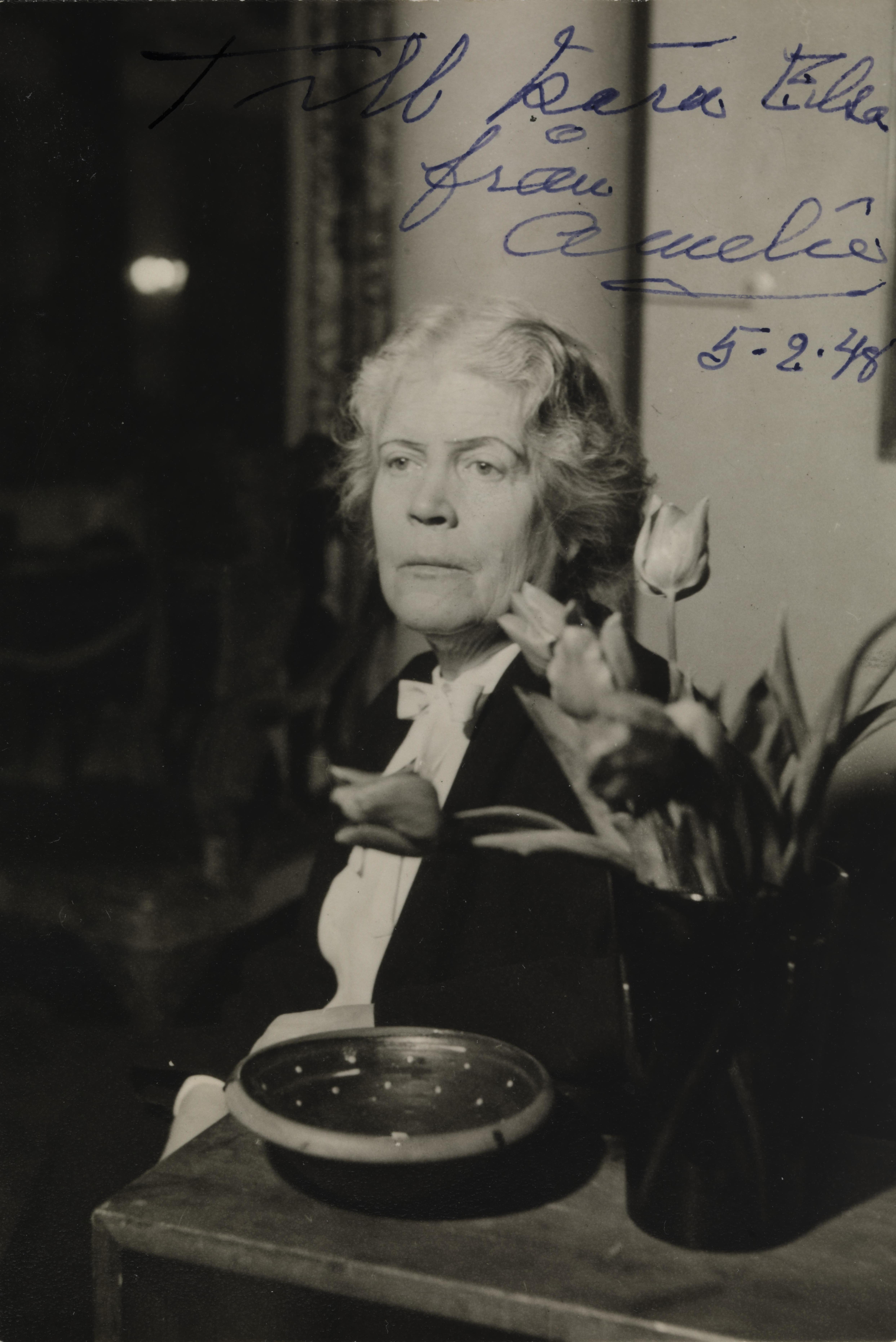 Bildet er hentet fra Nasjonalbibliotekets bildesamling Depicted person: Posse-Brazdova, Amelie